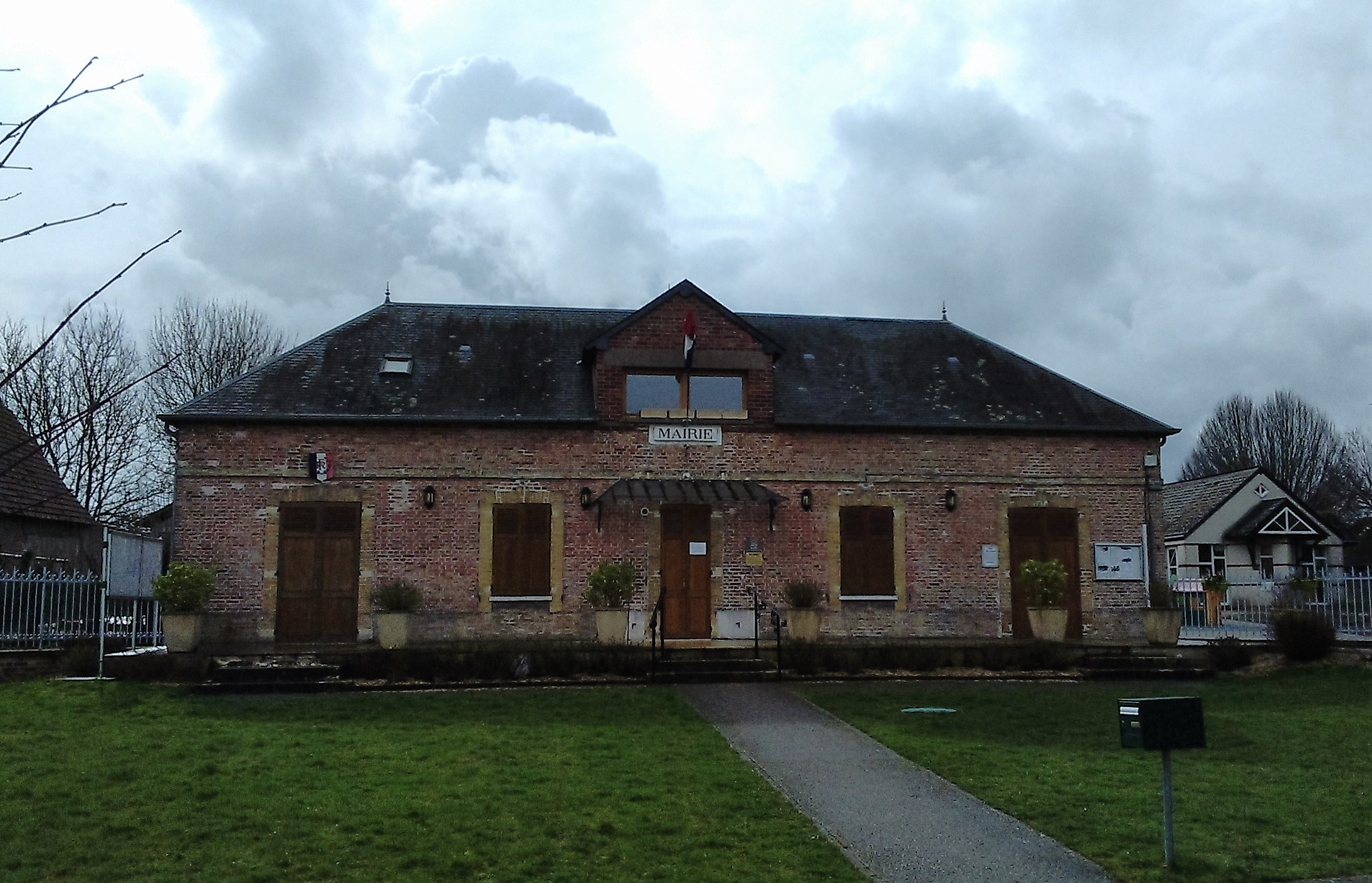 Mairie de Guiseniers